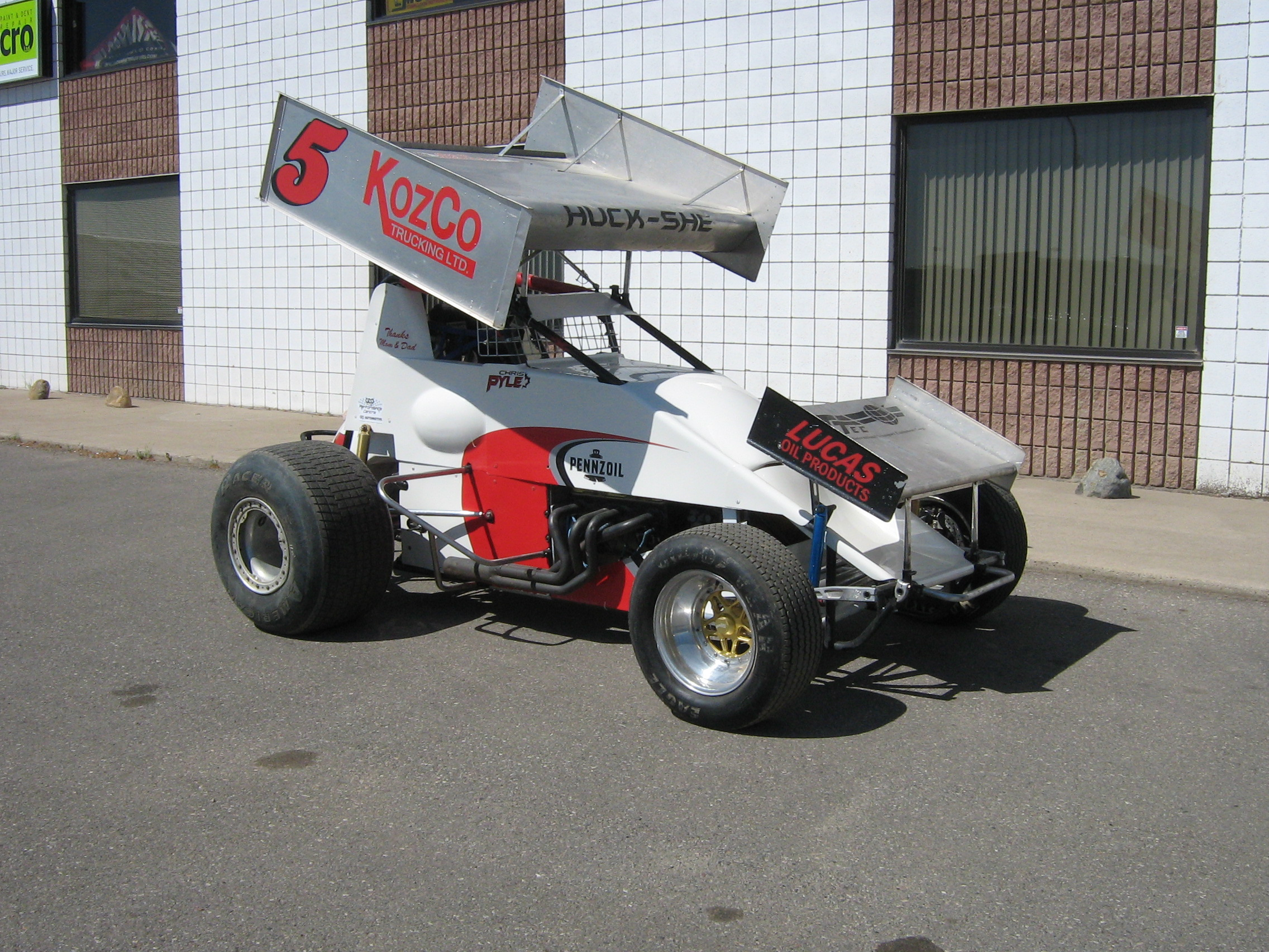 Sprint Race Car